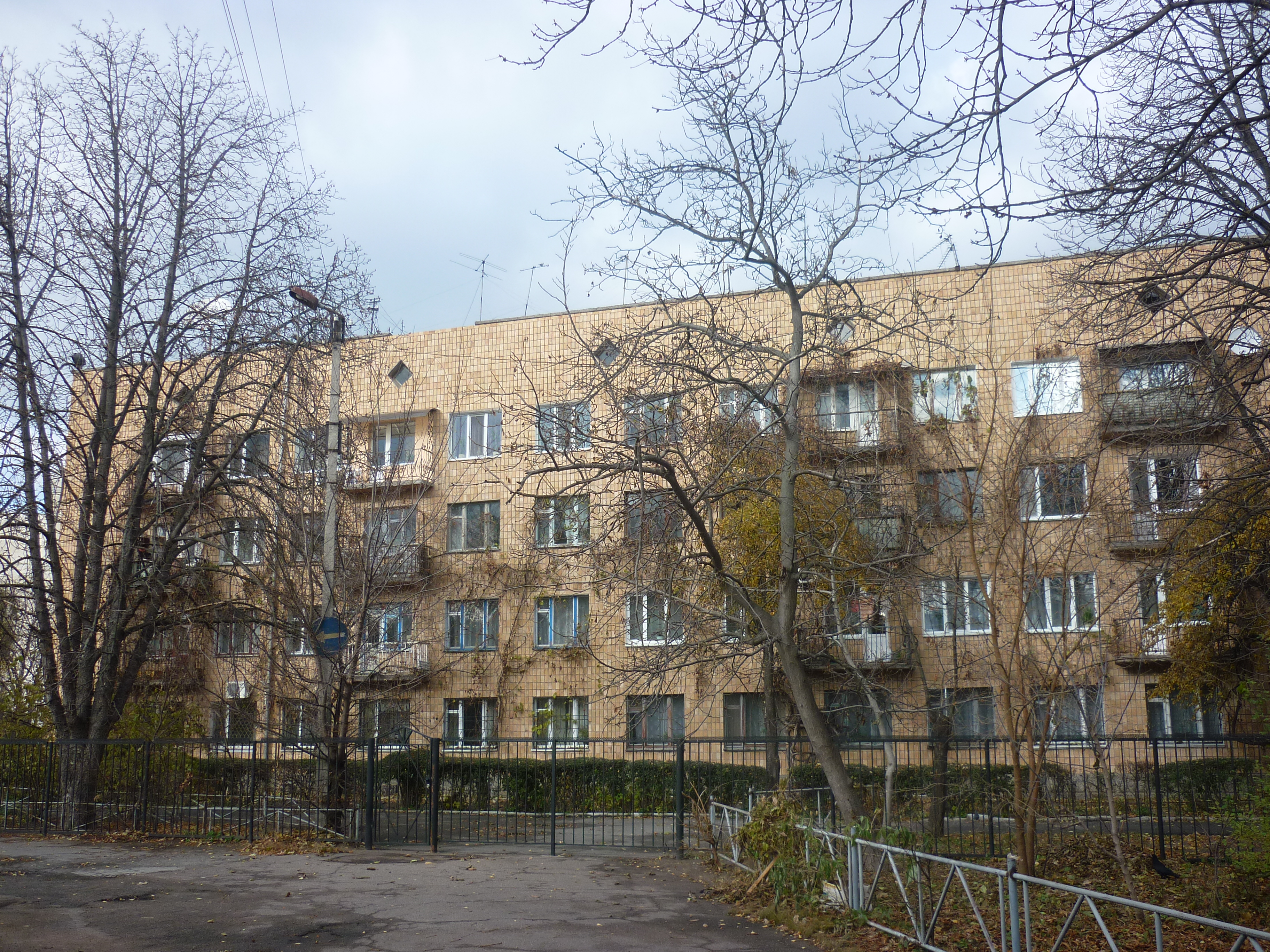 Будинок №10 по вулиці Байди Вишневецього в Черкасах, де жив Лутак Іван Кіндратович, і де встановлена пам'ятна дошка на його честь